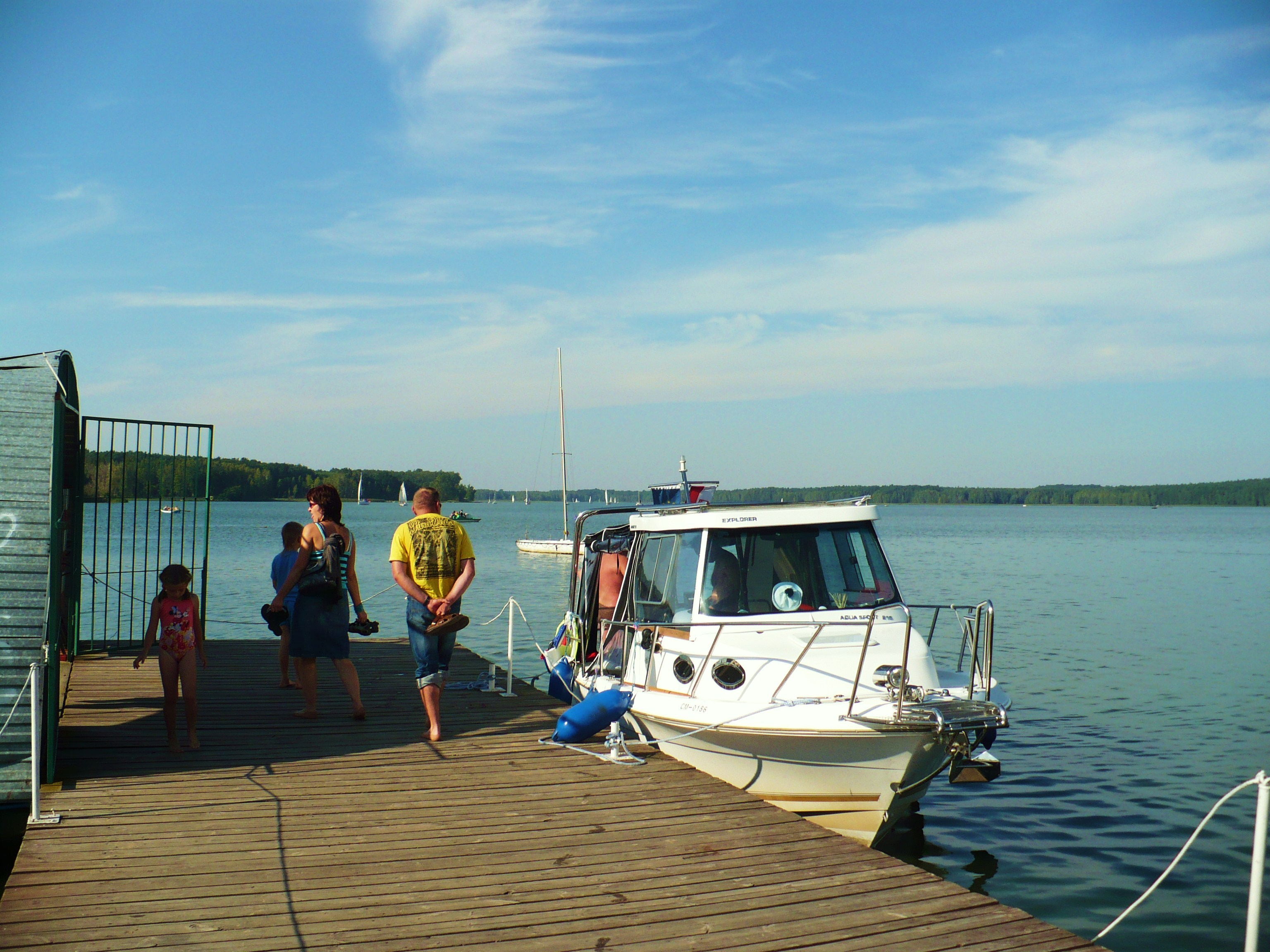 Pomost w Pieczyskach